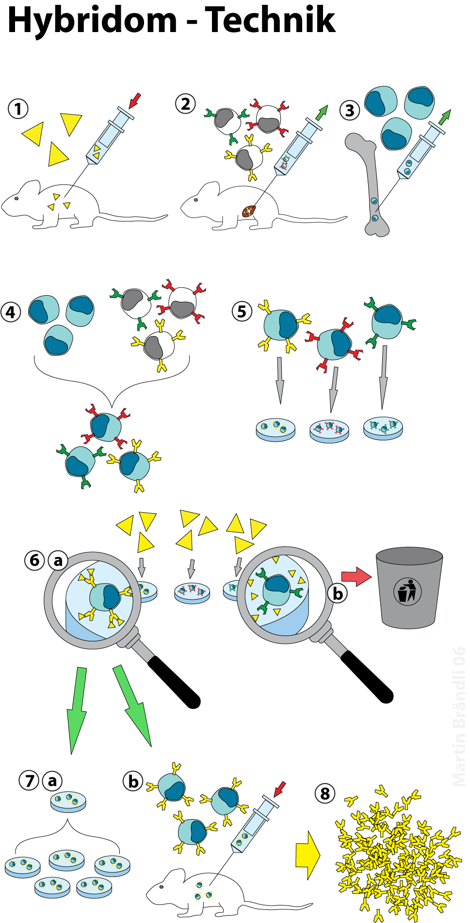 Schematische Darstellung der Produktion monoklonaler Antikörper durch Hybridomtechnik